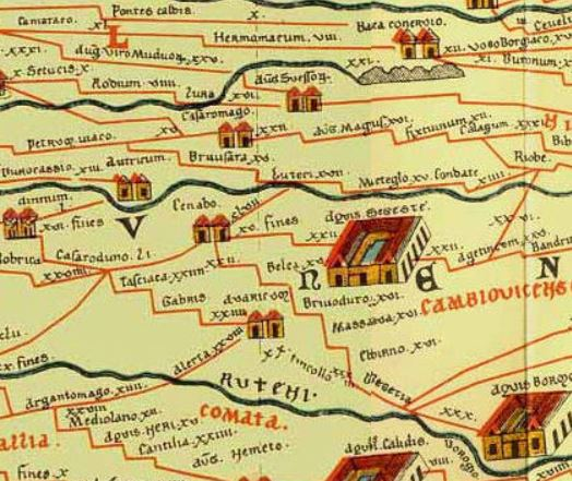 Cenabum - Orléans sur carte de Peutinger.